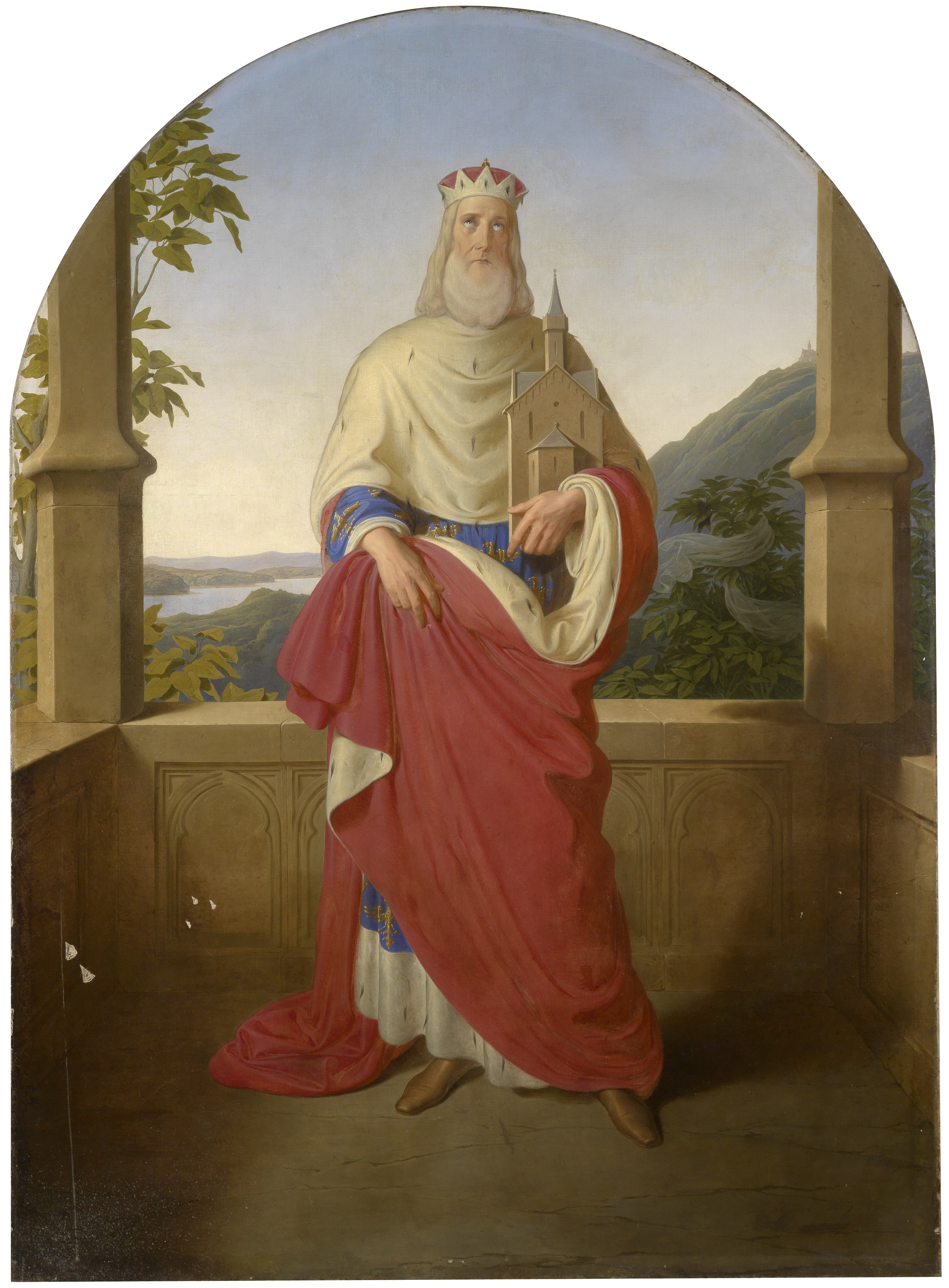 Der heilige Leopold vor einer Donauansicht und dem Leopoldsberg im Hintergrund